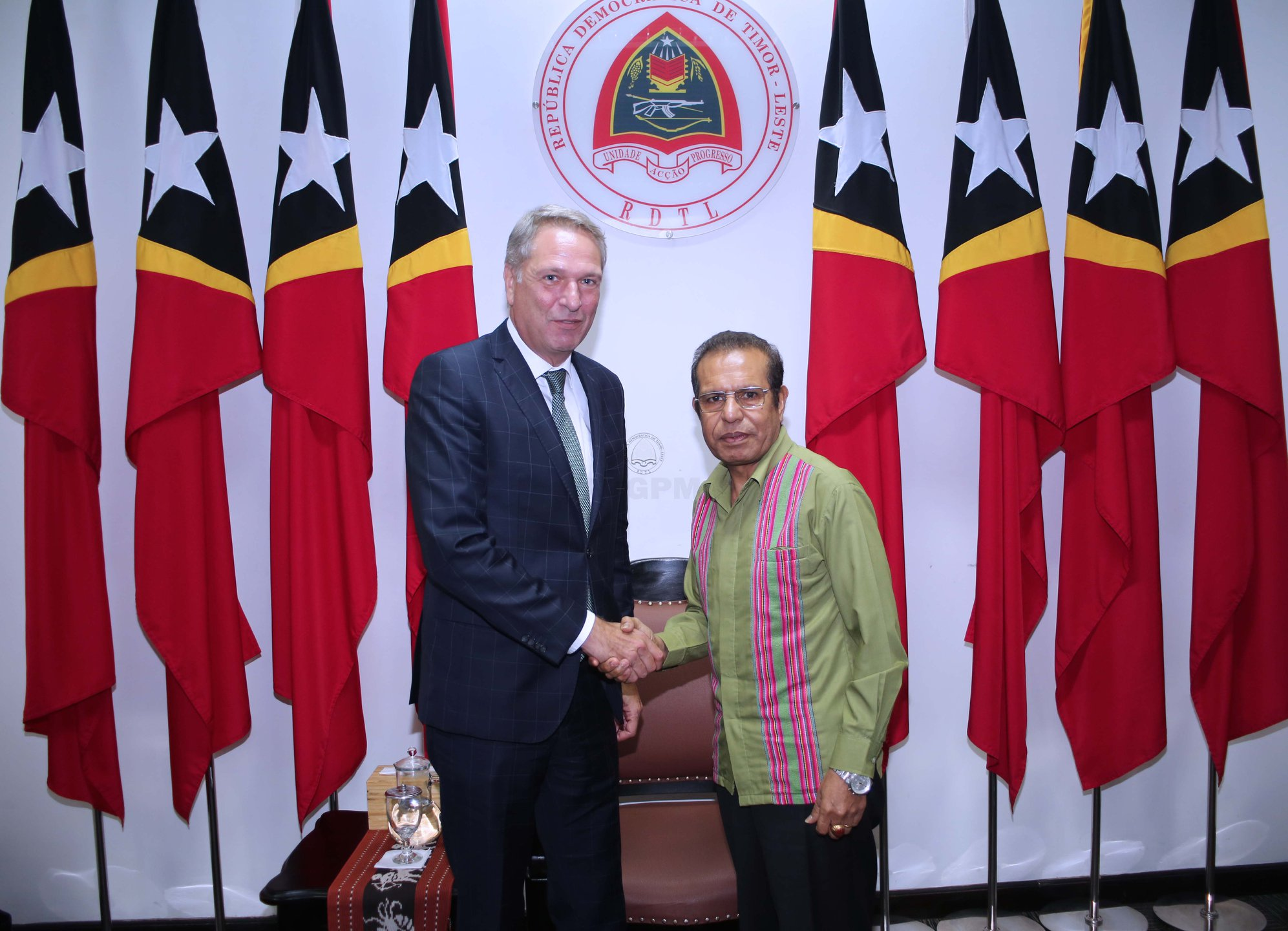 Rob Swartbol, niederländischer Botschafter in Indonesien und Osttimor, und Francisco Guterres, Präsident Osttimors